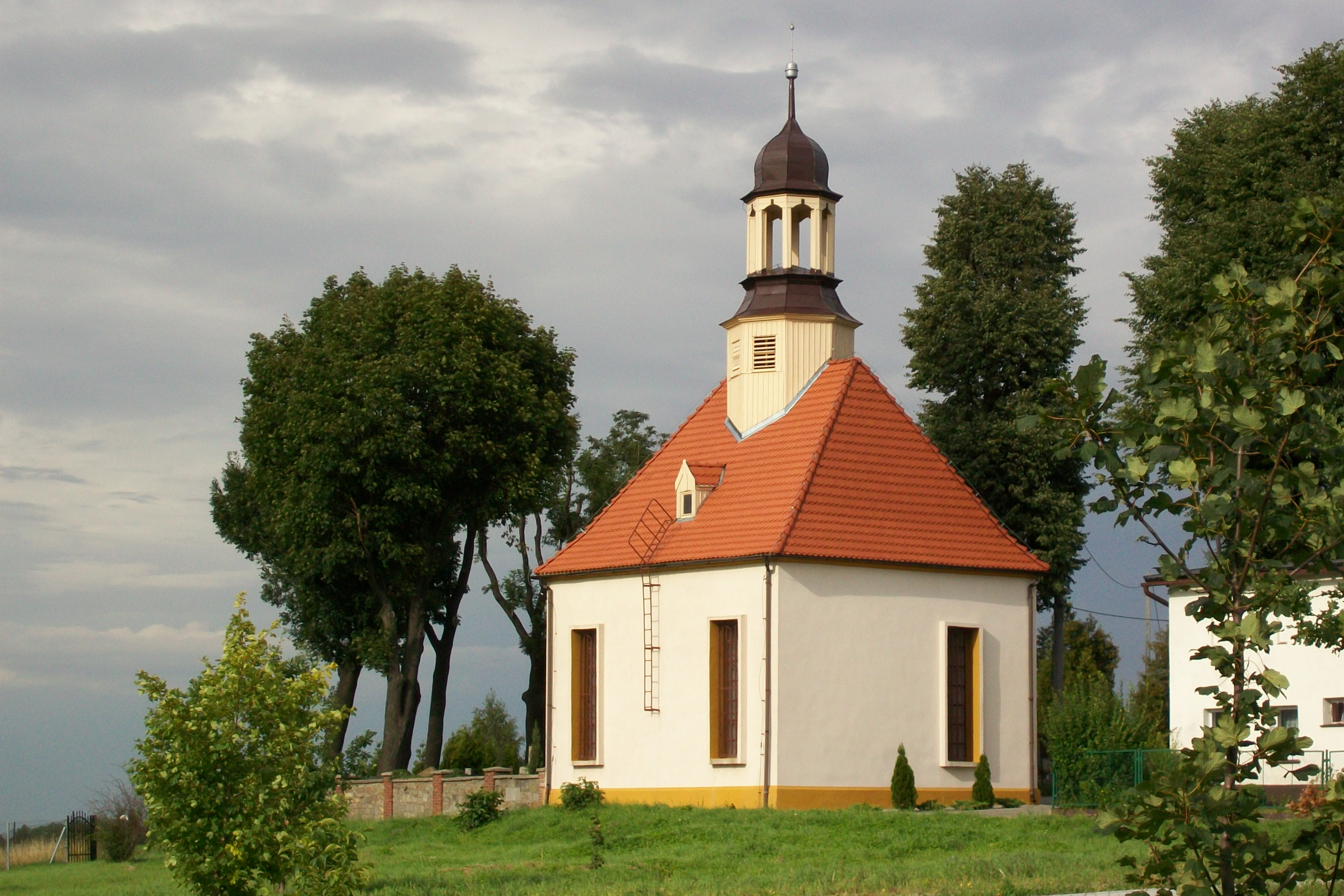 Friedhofskapelle in Szczawno Zdrój / Bad Salzbrunn (Polen).